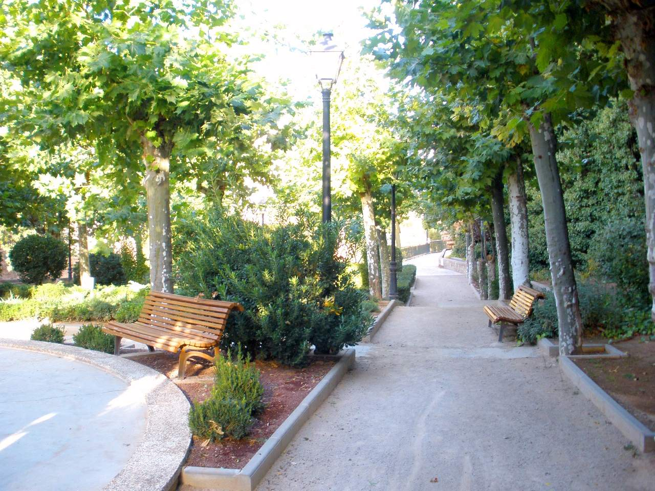 Parque fluvial de Muel (Zaragoza)